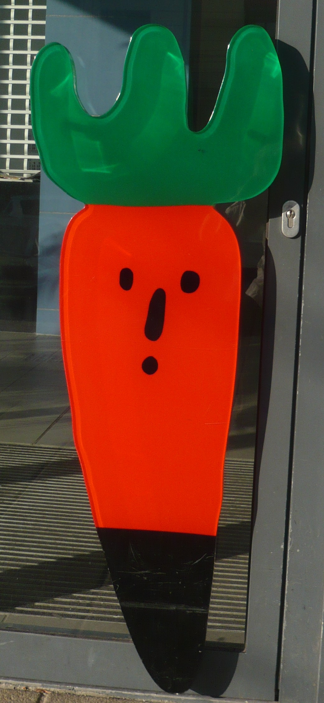 Gustavohaus im Bezirk Lichtenberg